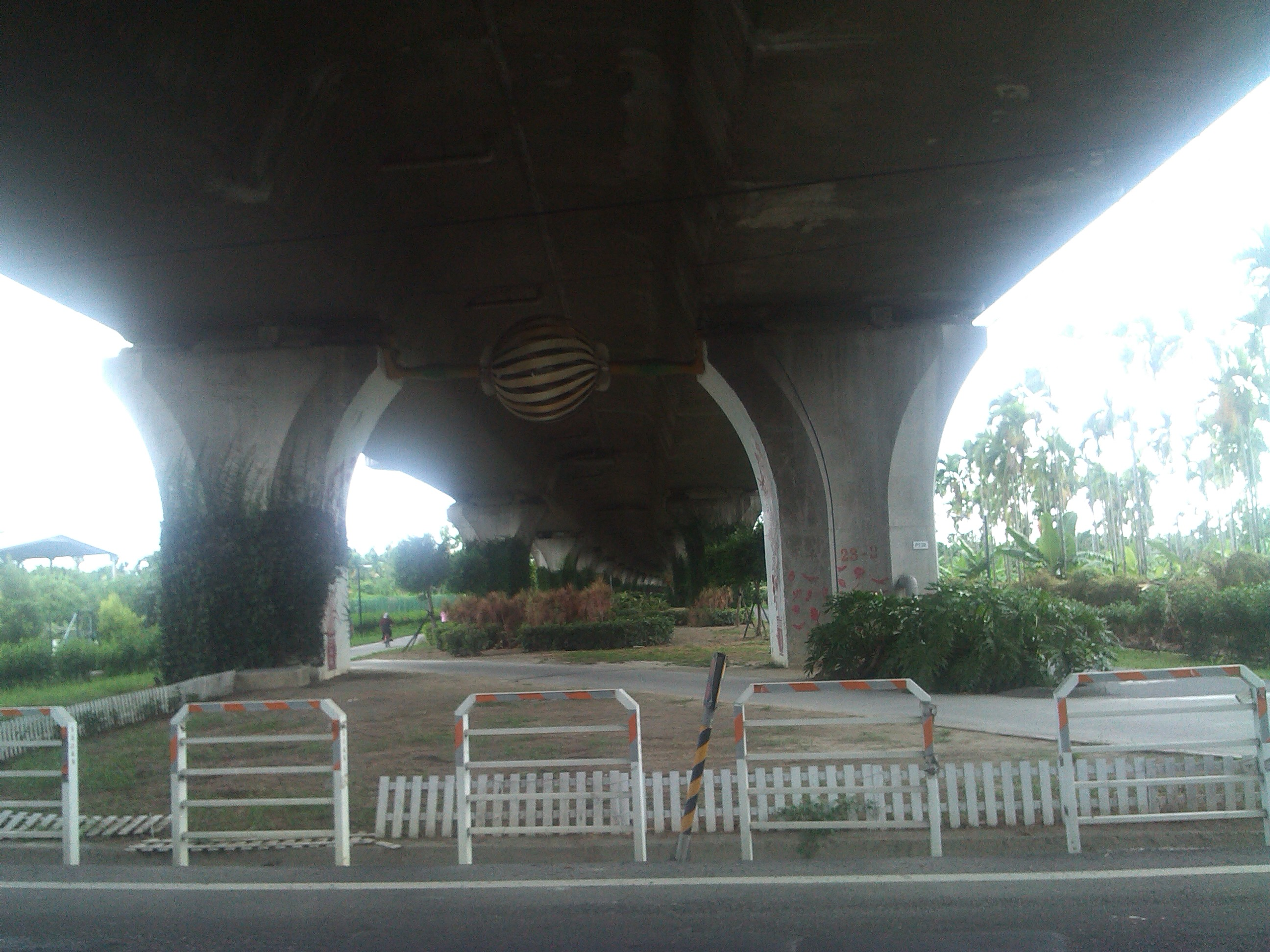 地理位置大致位於竹田鄉西勢村新勢及瑞竹路口